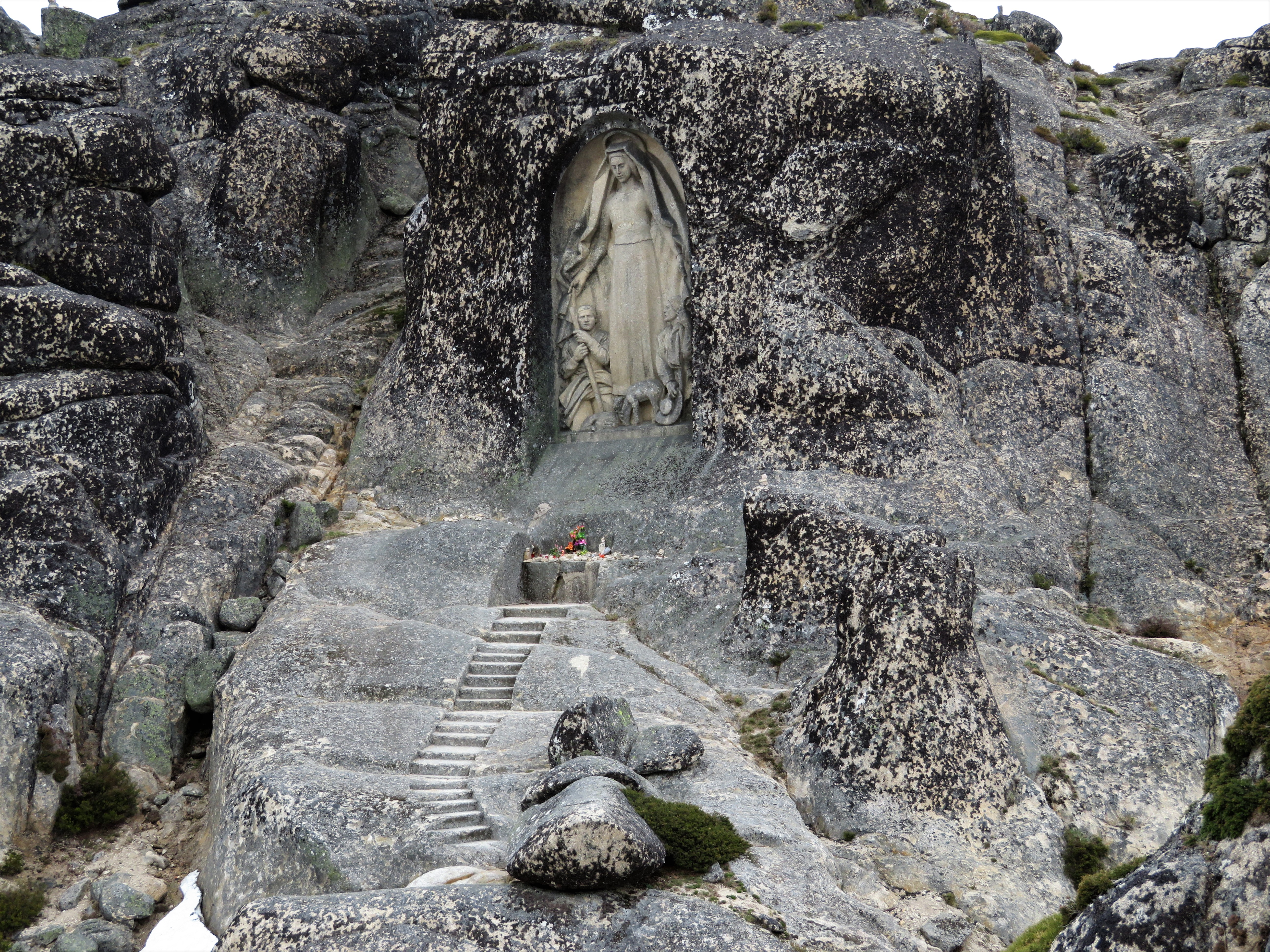 Fotografia tirada na Serra da Estrela, já na descida, em 9 de Maio de 2018. Nesta foto, o Santuário de Nossa Senhora da Boa Estrela escavado na rocha granítica. This is a photography of a Site of Community Importance in Portugal with the ID: PTCON0014. Natura2000 entry, EEA entry